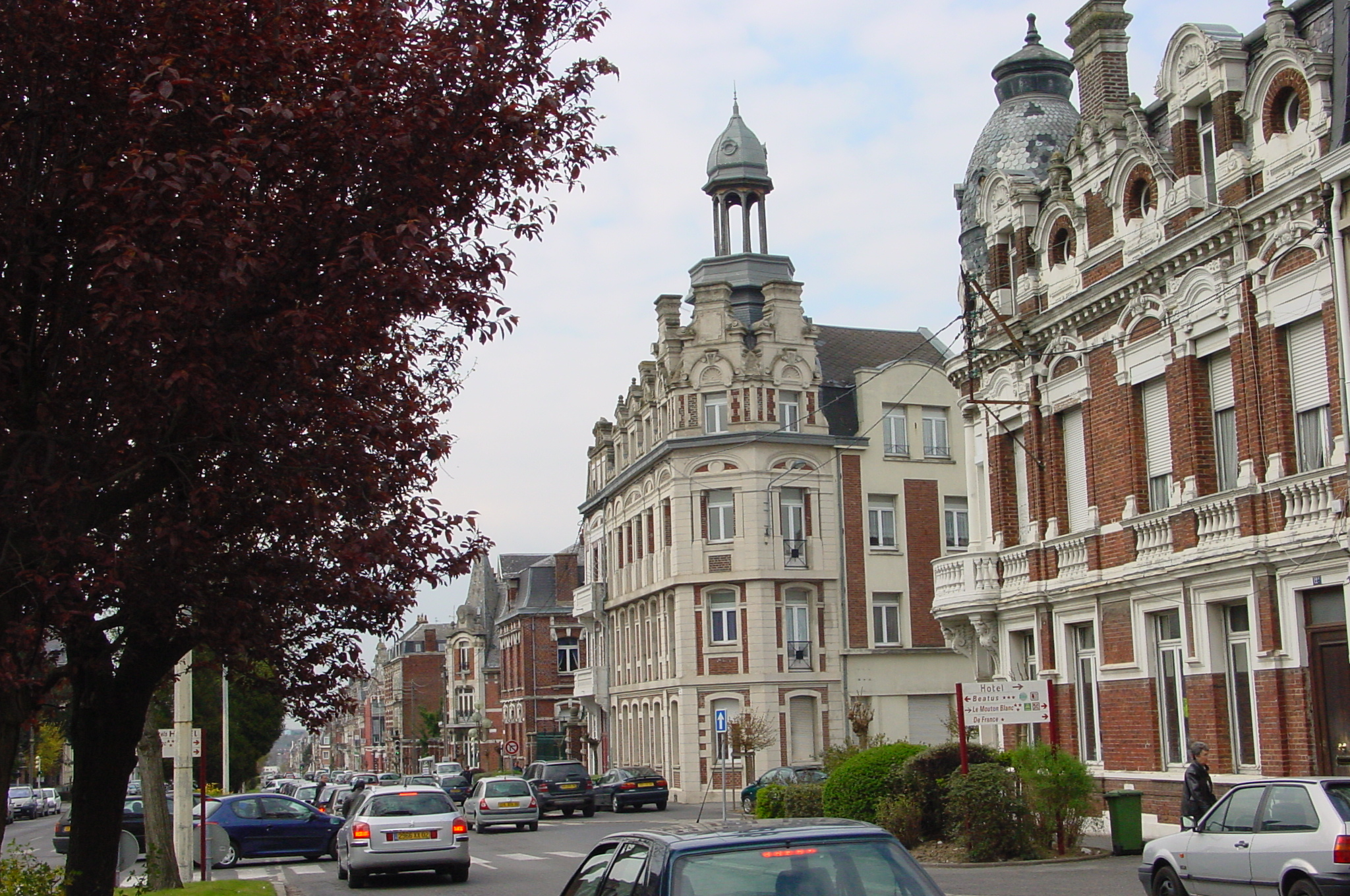 le Boulevard Faidherbe à Cambrai, tracé en 1898 sur l'emplacement des fortifications détruites.